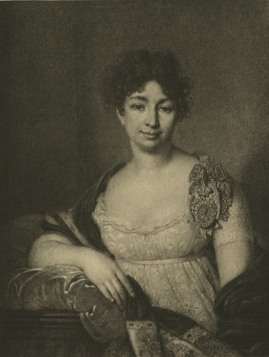 Лопухина Екатерина Николаевна (светлейшая княгиня)